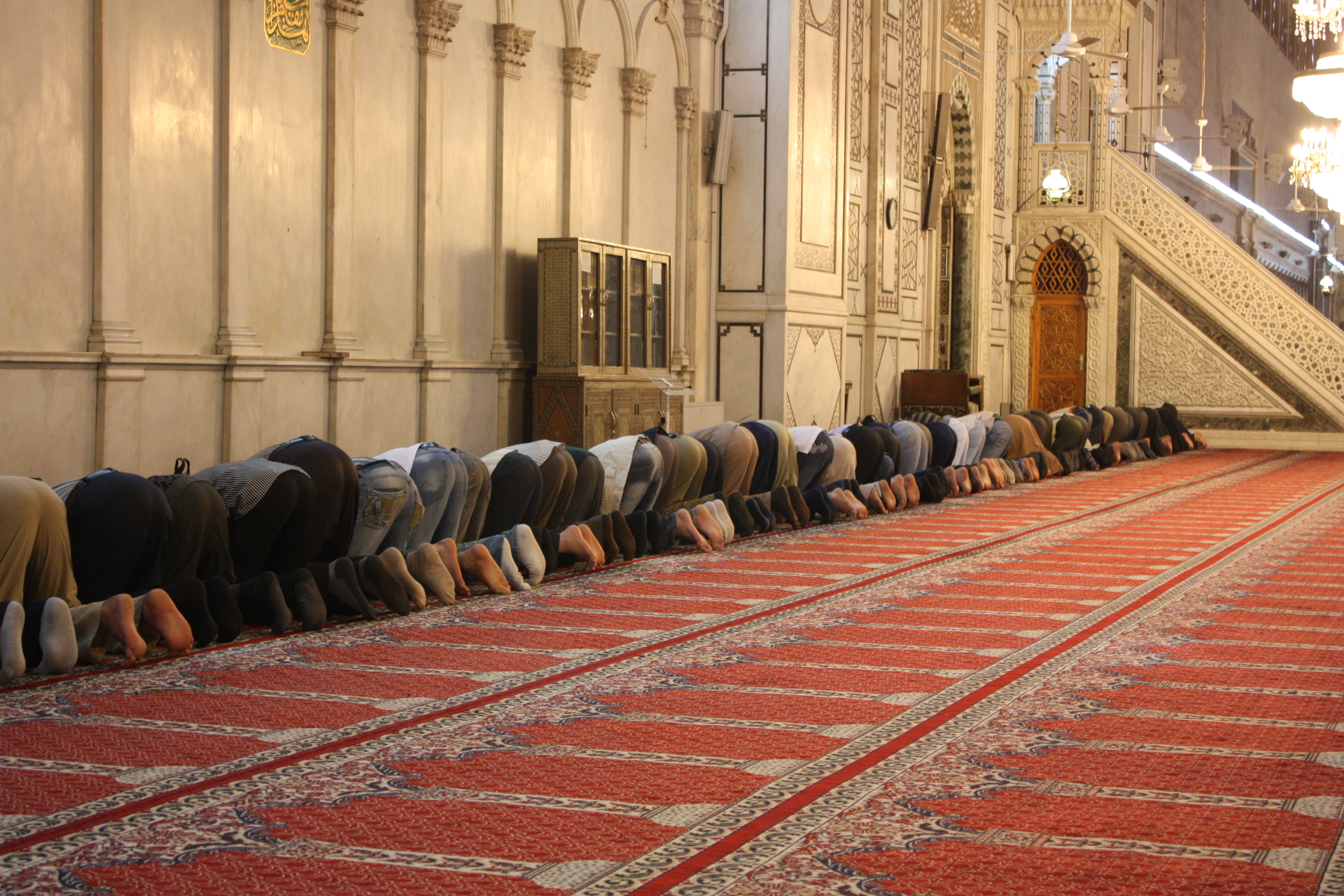 Damascus, Umayyad Mosque, prayers